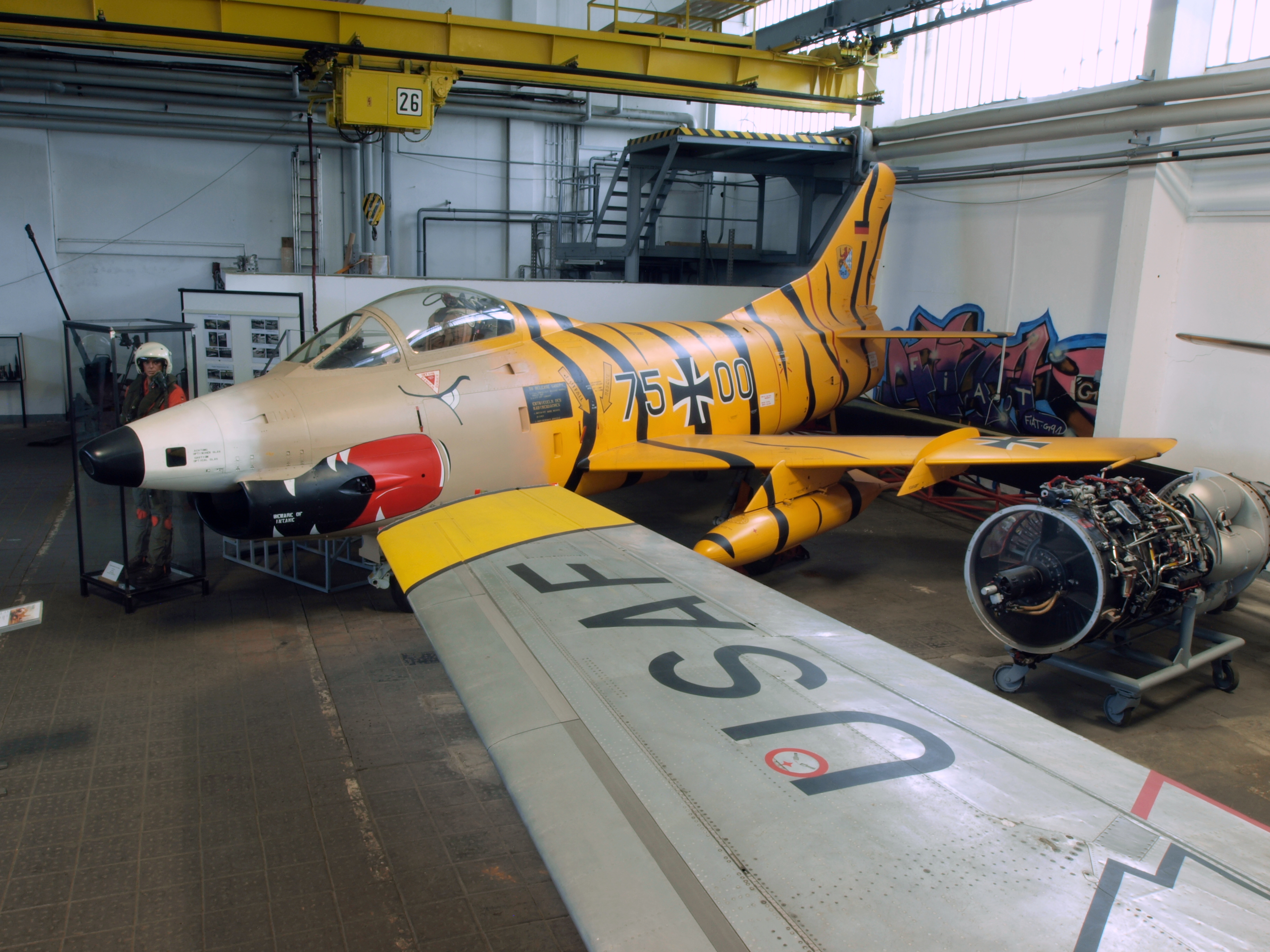 Fiat G91 Tigercamo 75+00.